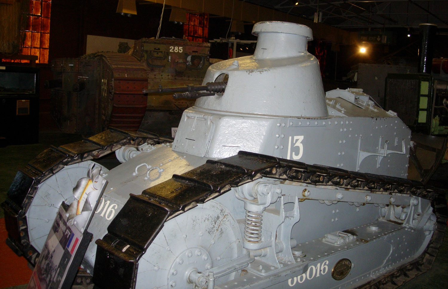 Renault FT 17 tank in Bovington Tank Museum.